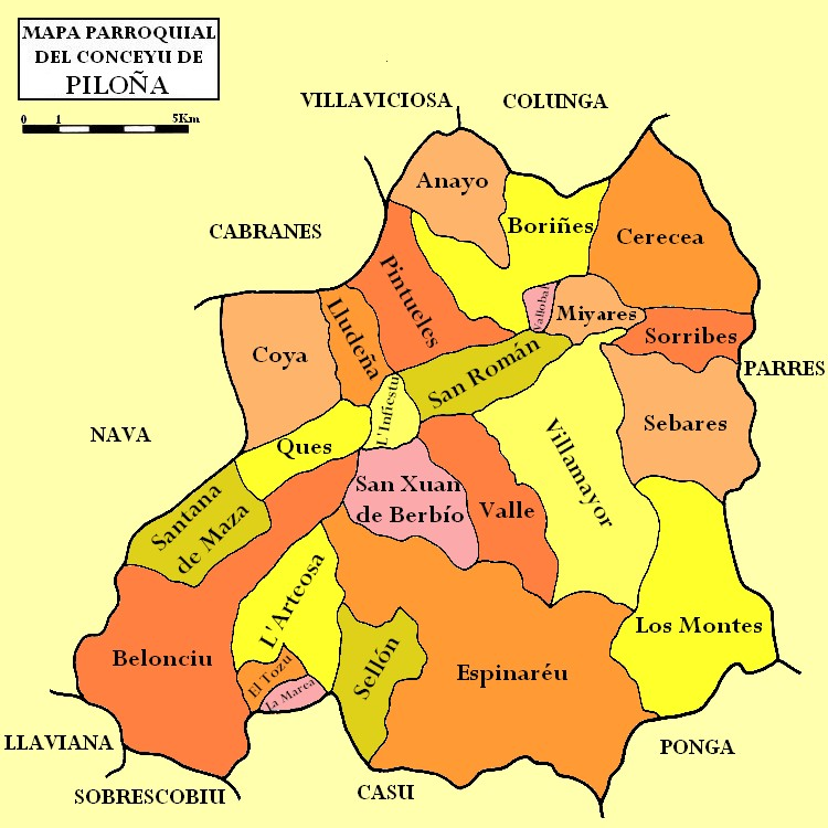 Mapa parroquial del Conceyu de Piloña, dixebráu en colores.